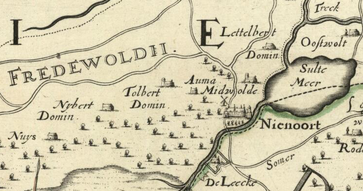 Uitsnede Coenderskaart van deel Vredewold met Auwema te Tolbert en Nienoord te Midwolde. Vervaardigd door W. en F. Coenders van Helpen & Cornelius Appeus tussen 1675 en 1680.